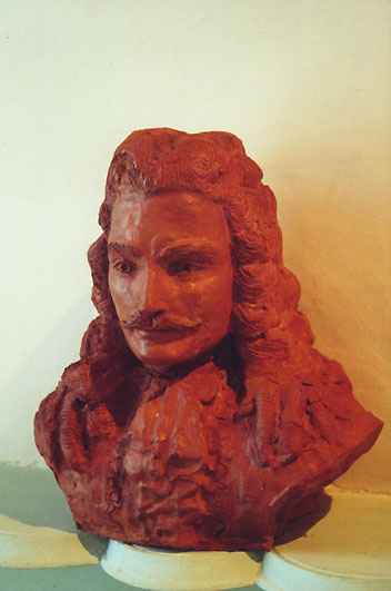 Buste de Lamothe Cadillac. Oeuvre de Délie Duparc. Terre cuite.